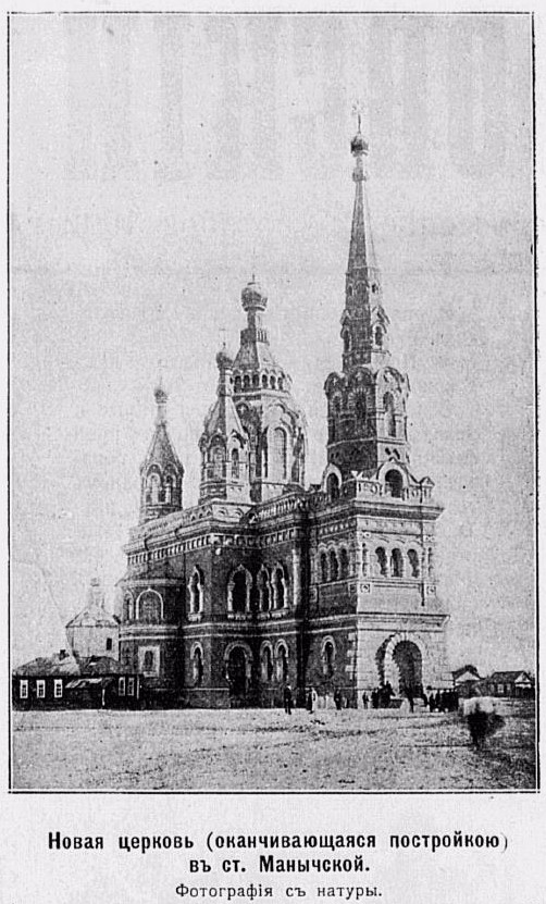 Церковь Параскевы Пятницы, станица Манычская, Ростовская область, дореволюционное фото